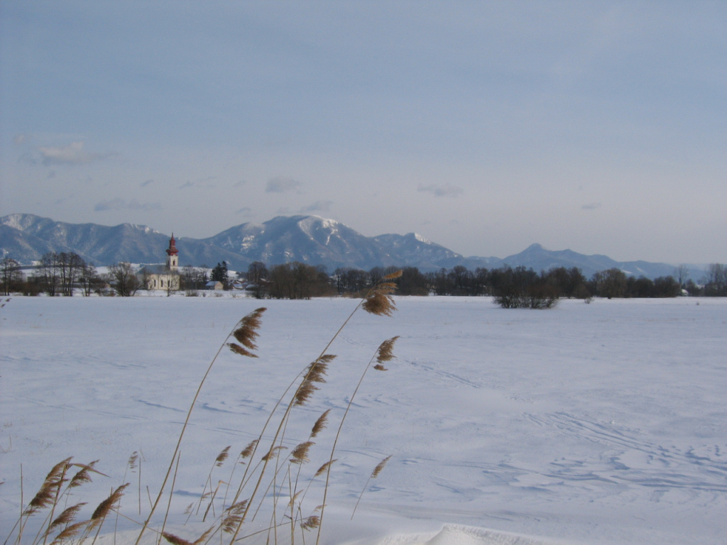 Slovenský región Turiec, pohľad z obce Príbovce na Veľkú Fatru; Autor: --Ondrejk 16:52, 12 mar 2005 (UTC) Fotené: zima 2005